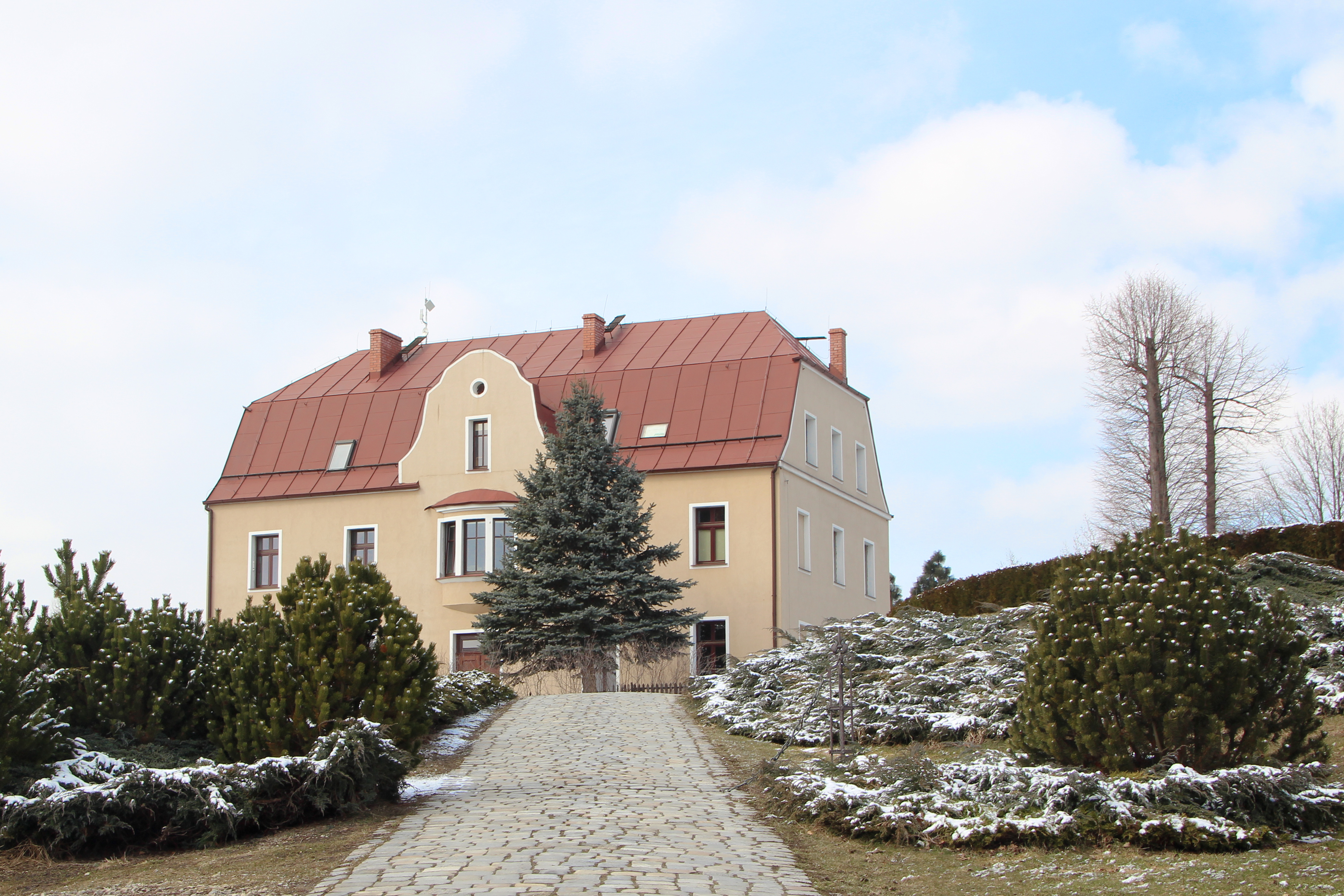 Biskupów – wieś w Polsce, w województwie opolskim, w powiecie nyskim, w gminie Głuchołazy.